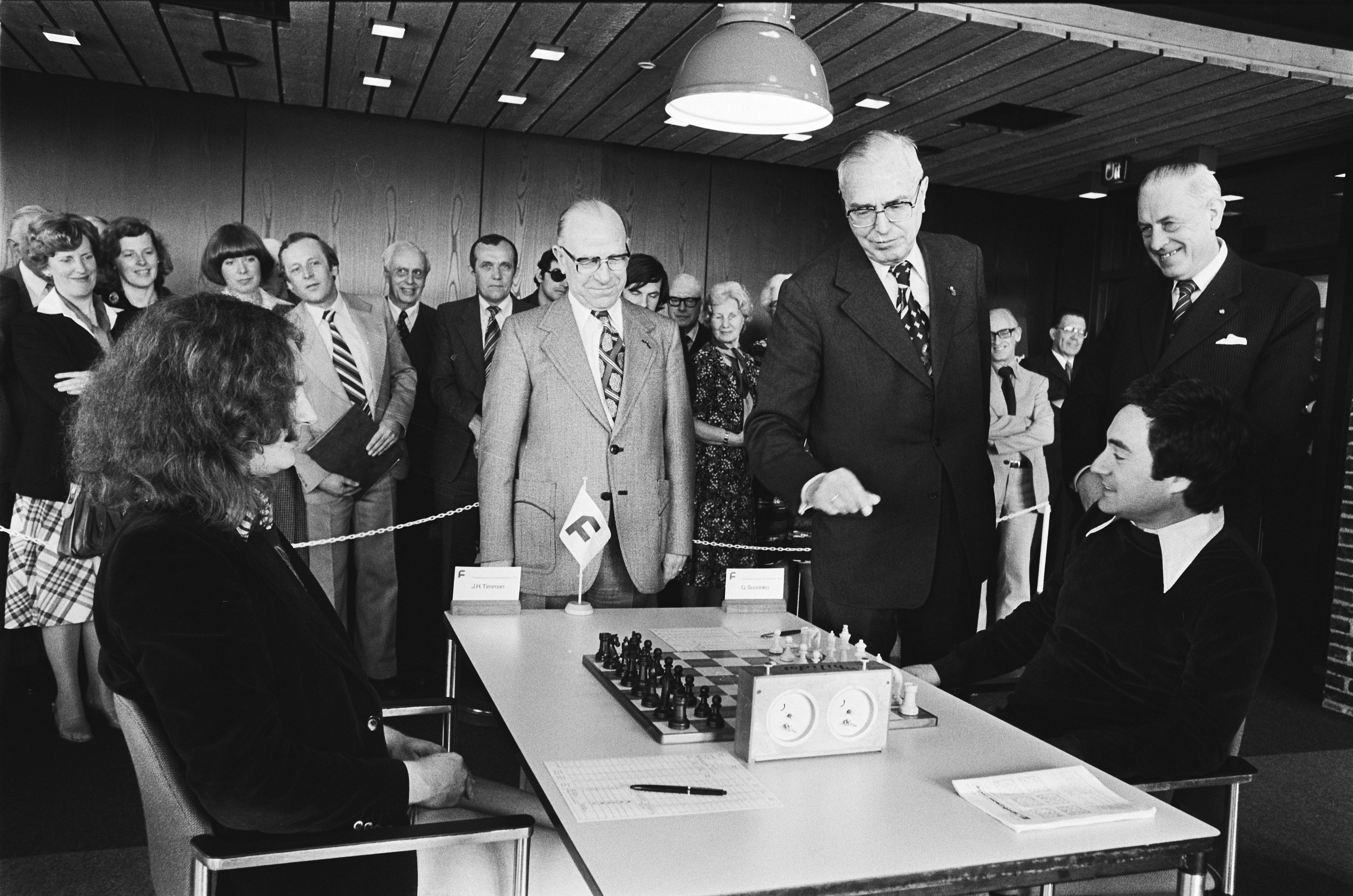 Collectie / Archief : Fotocollectie Anefo Reportage / Serie : [ onbekend ] Beschrijving : Nederlandse kampioenschap schaken, Leeuwarden; Euwe doet openingszet Datum : 17 april 1978 Locatie : Friesland, Leeuwarden Trefwoorden : KAMPIOENSCHAPPEN, SCHAKEN Fotograaf : Verhoeff, Bert / Anefo Auteursrechthebbende : Nationaal Archief Materiaalsoort : Negatief (zwart/wit) Nummer archiefinventaris : bekijk toegang 2.24.01.05 Bestanddeelnummer : 929-6758